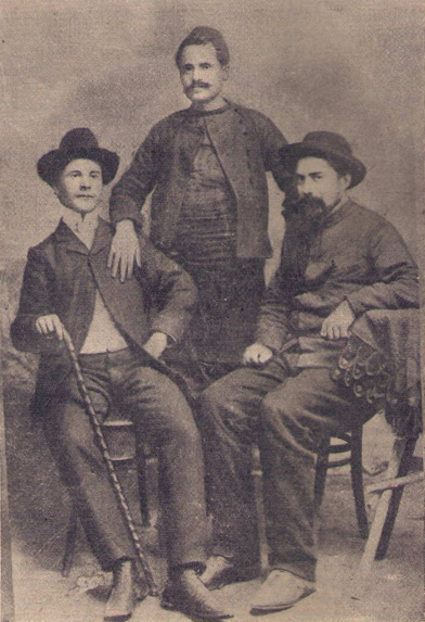 Boyko Chavdarov, Georgi Geshakov, Konstantin Nenchov